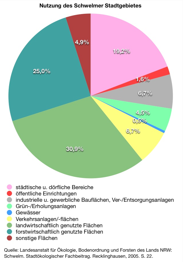 Flächennutzung in Schwelm (2005)